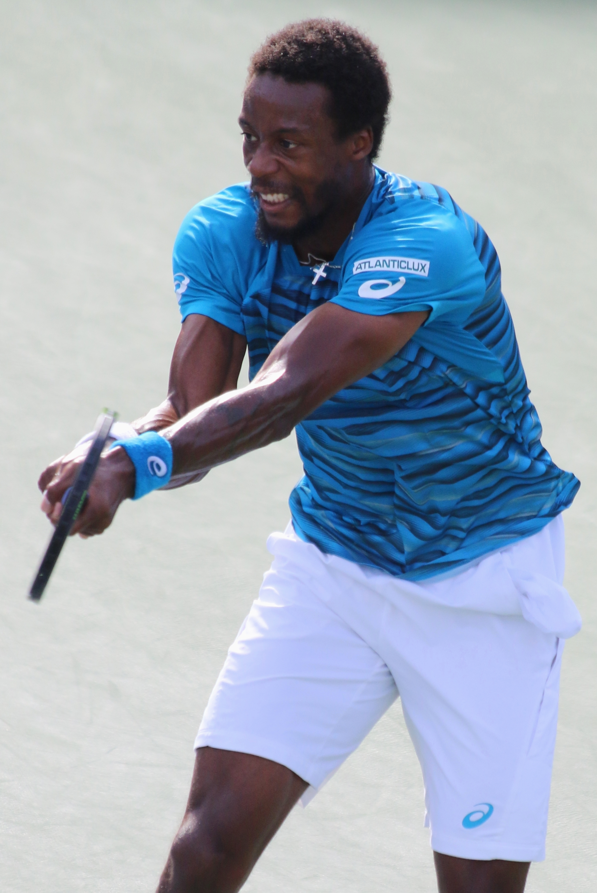 Monfils US16 (101)